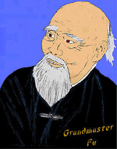 Grandmaster Fu Xi-Wen, Founder of Shen Lung Kung Fu